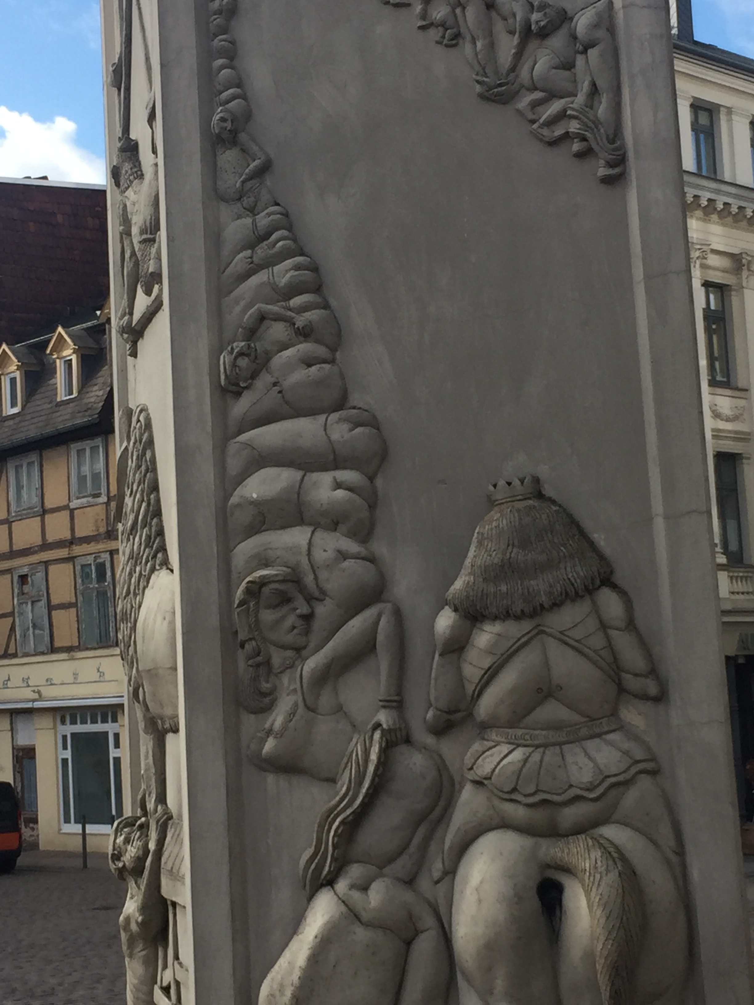 Die Bardowicker Gesäßhuldigung auf dem Löwendenkmal